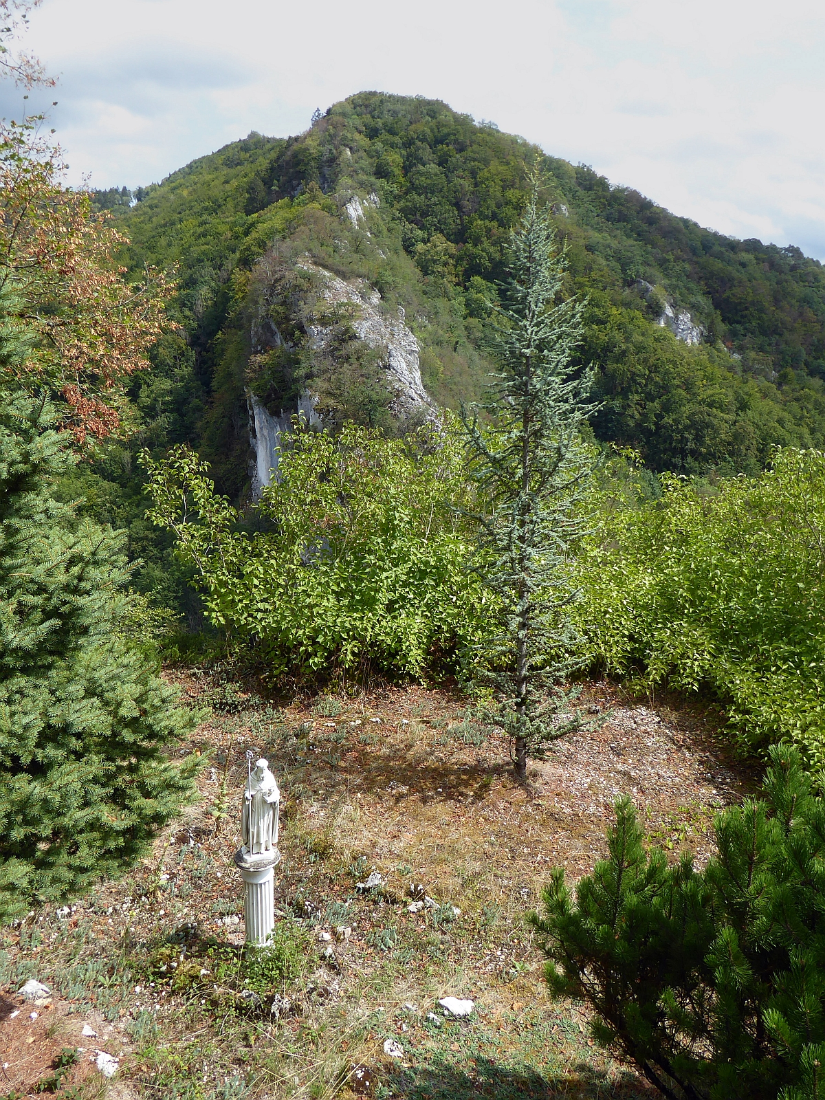 Garten von Chapelle du Vorbourg